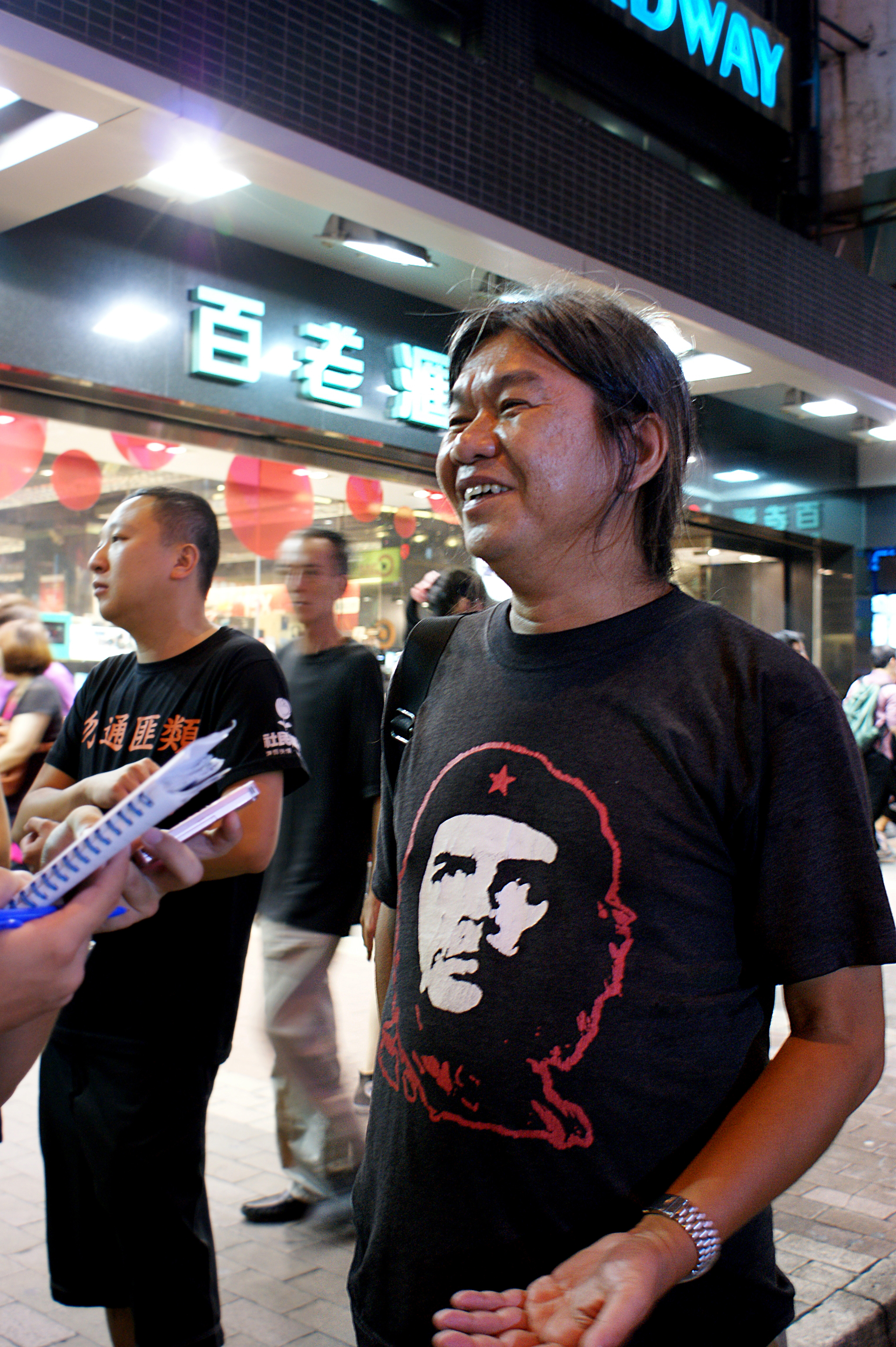 中文（香港）: 梁國雄出席8.13要求教協罷課遊行